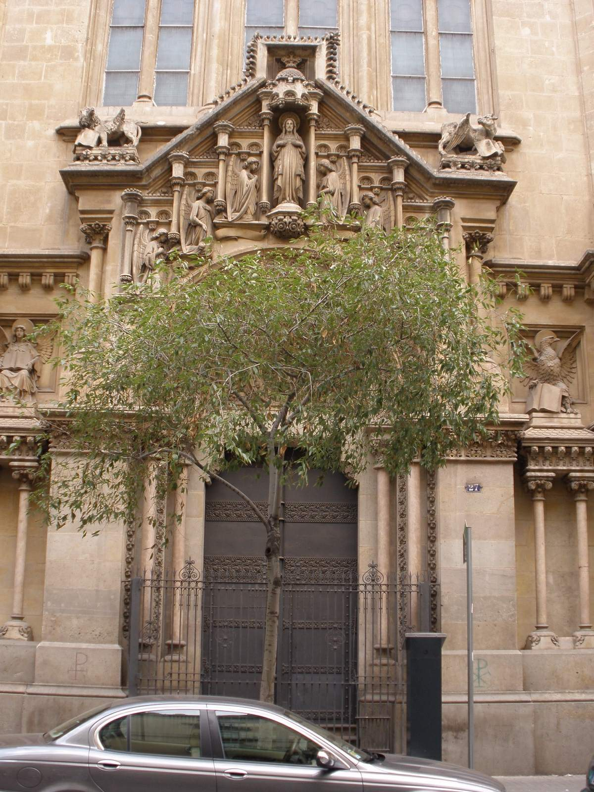 Barcelona - Iglesia del Colegio Casp-Sagrat Cor de Jesús